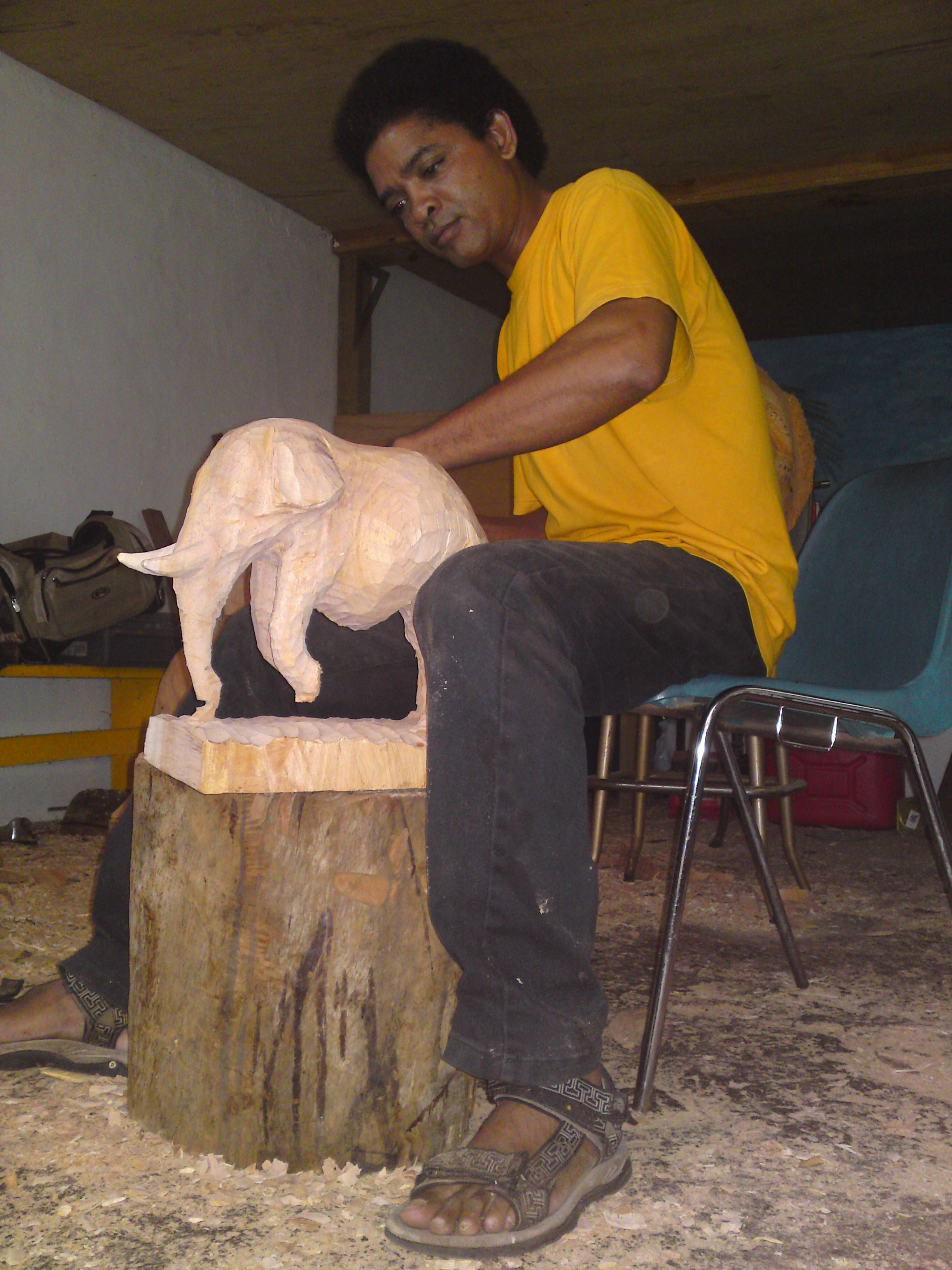 Narcisse Ranarison dans son atelier aux Trois Ilets, Martinique